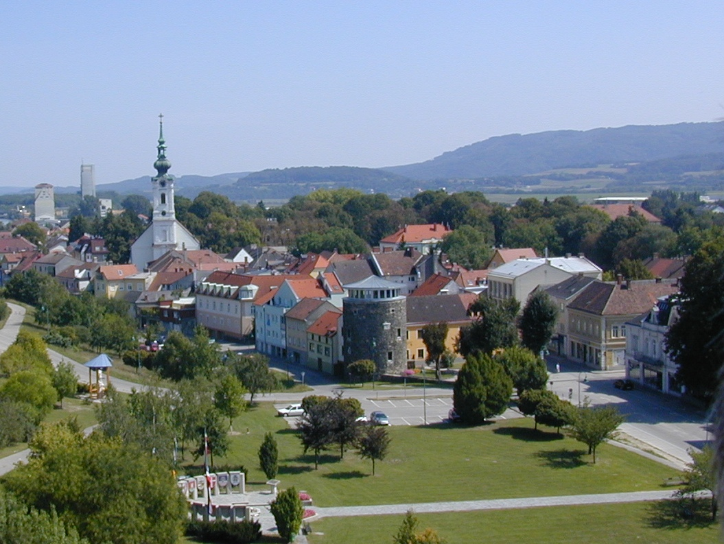 Pöchlarn